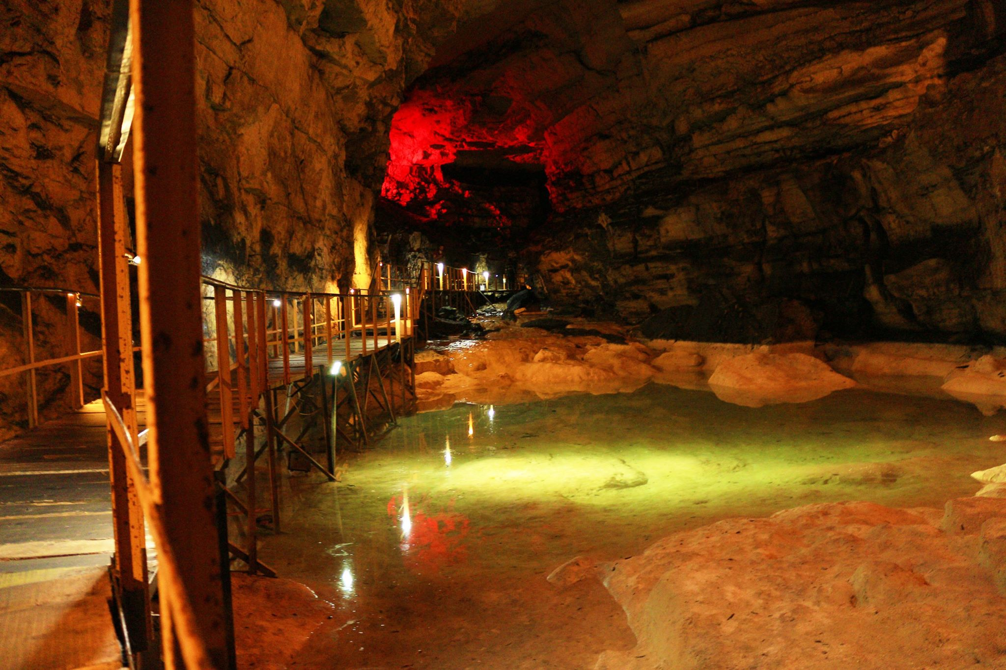 mağaranın içi